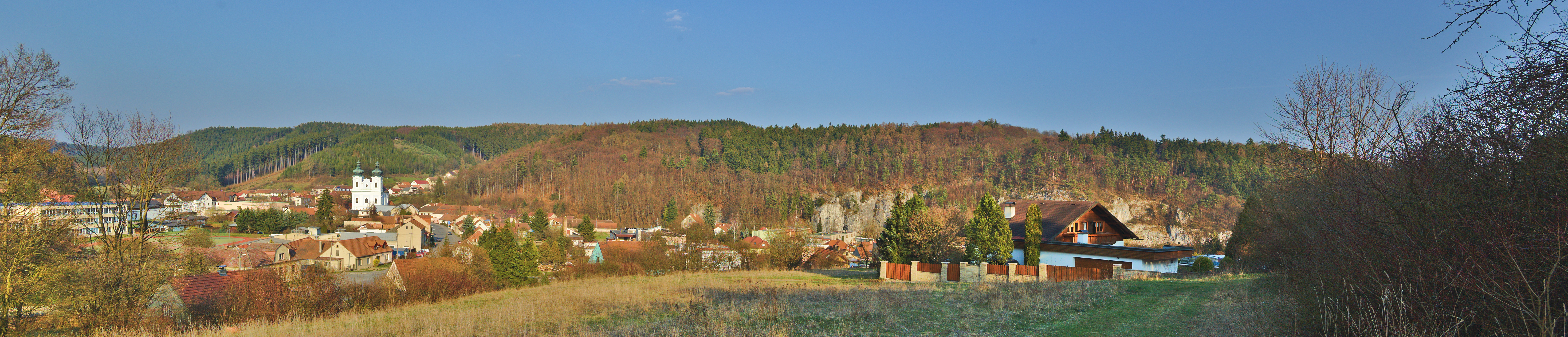 Pohled na obec od západu z modré turistické trasy, Sloup, okres Blansko